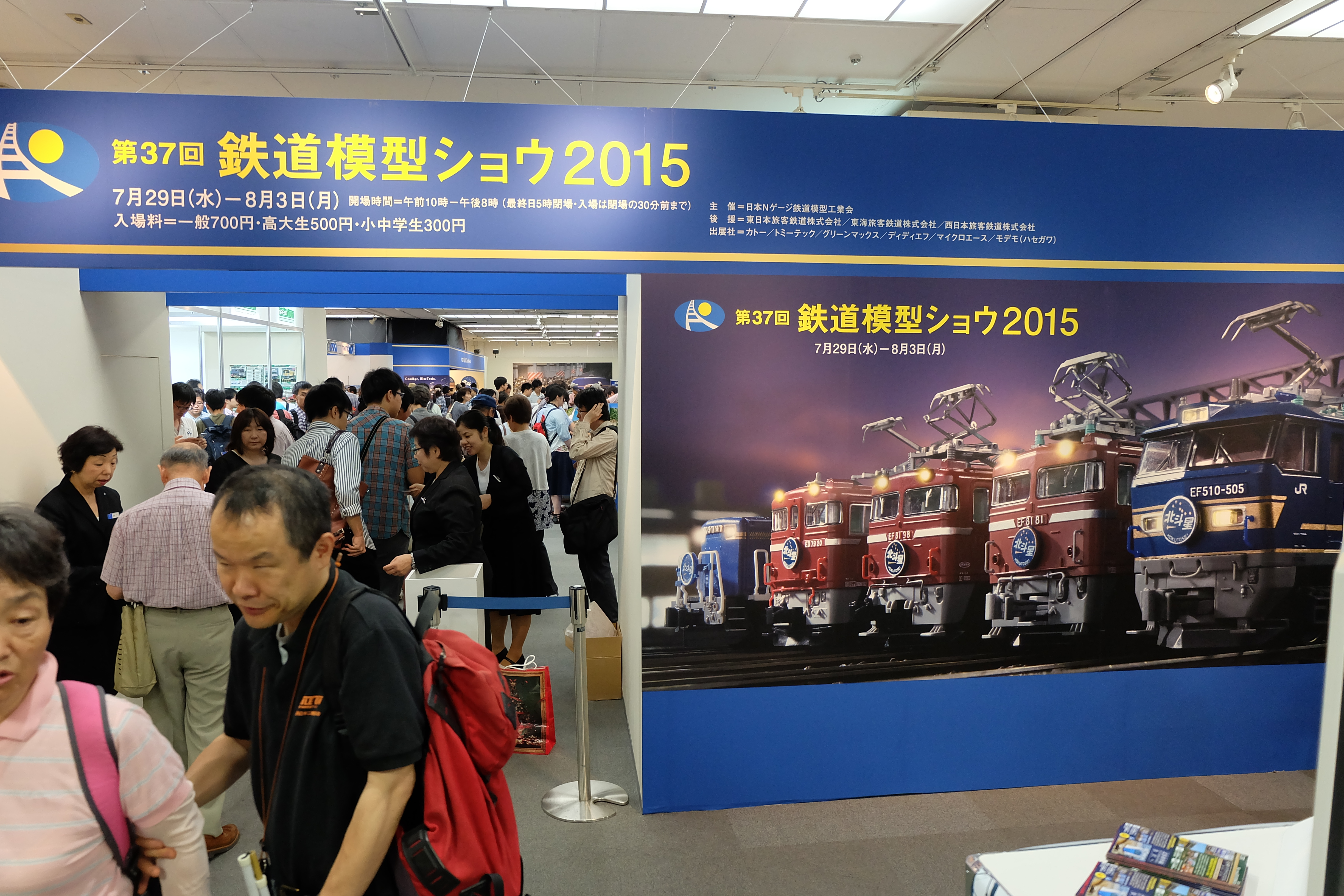 鉄道模型ショウ2014 入口